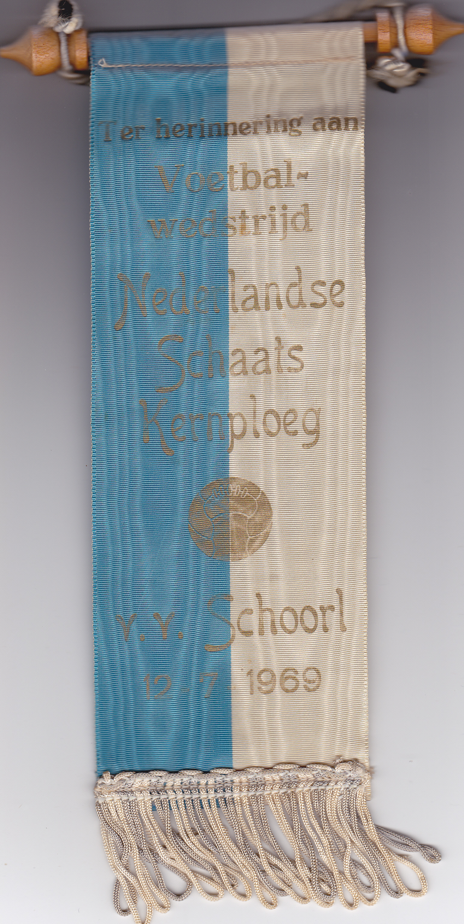 Voetbalwedstrijd Schaatskernploeg VV schoorl 1969